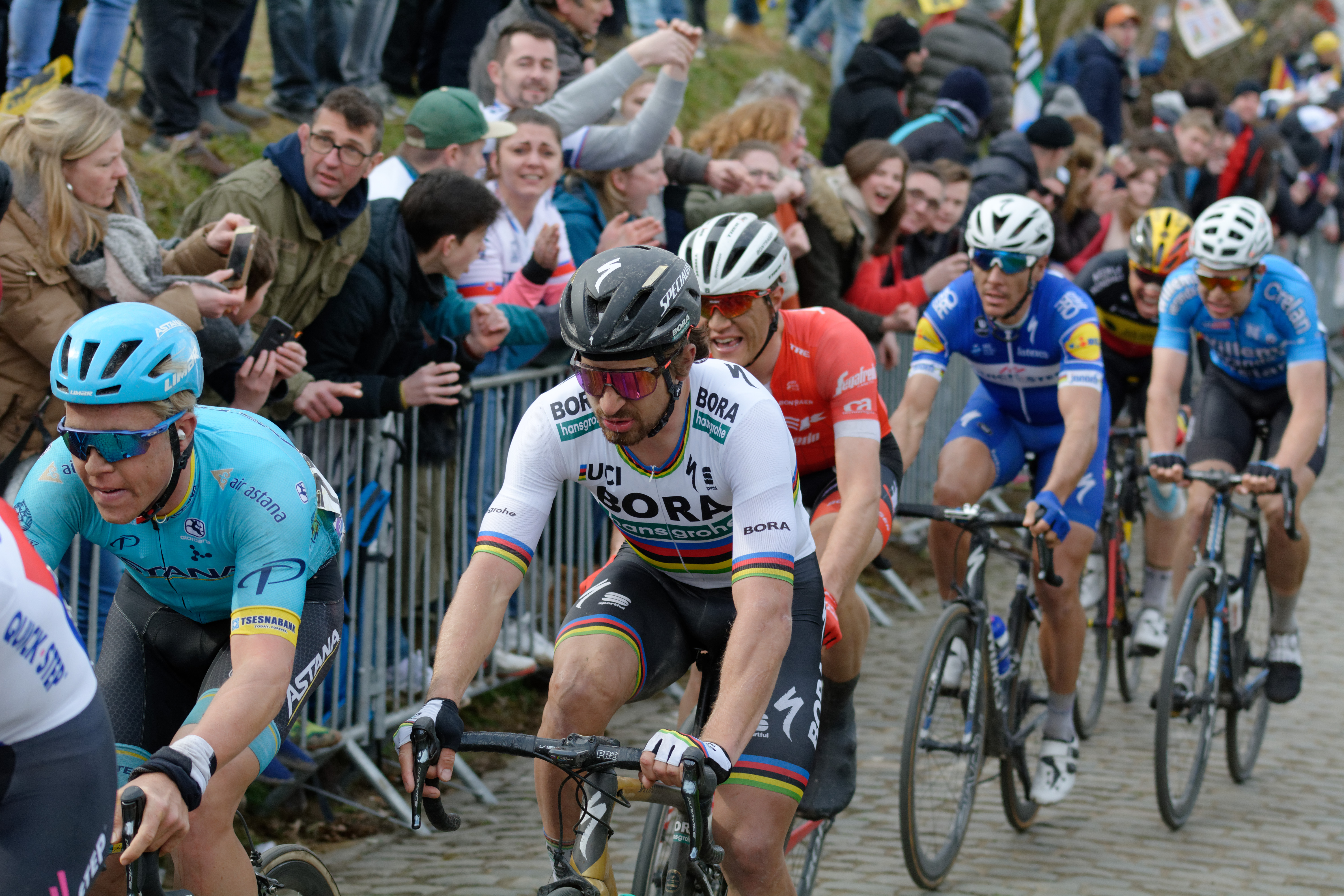 Ronde Van Vlaanderen 2018 / Tour of Flanders 2018 Oude Kwaremont